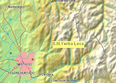 Yerba Loca, Santiago, Lo Barnechea